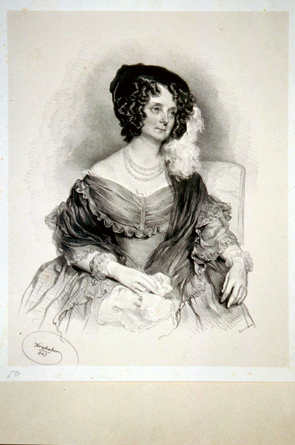 Isabella Gräfin Goëss, geb. Gräfin Türheim (1784-1855). 2. Ehefrau des Grafen Peter von Goess. Zeigte lebhaftes Interesse für die Erhaltung der Kärntner Altertümer